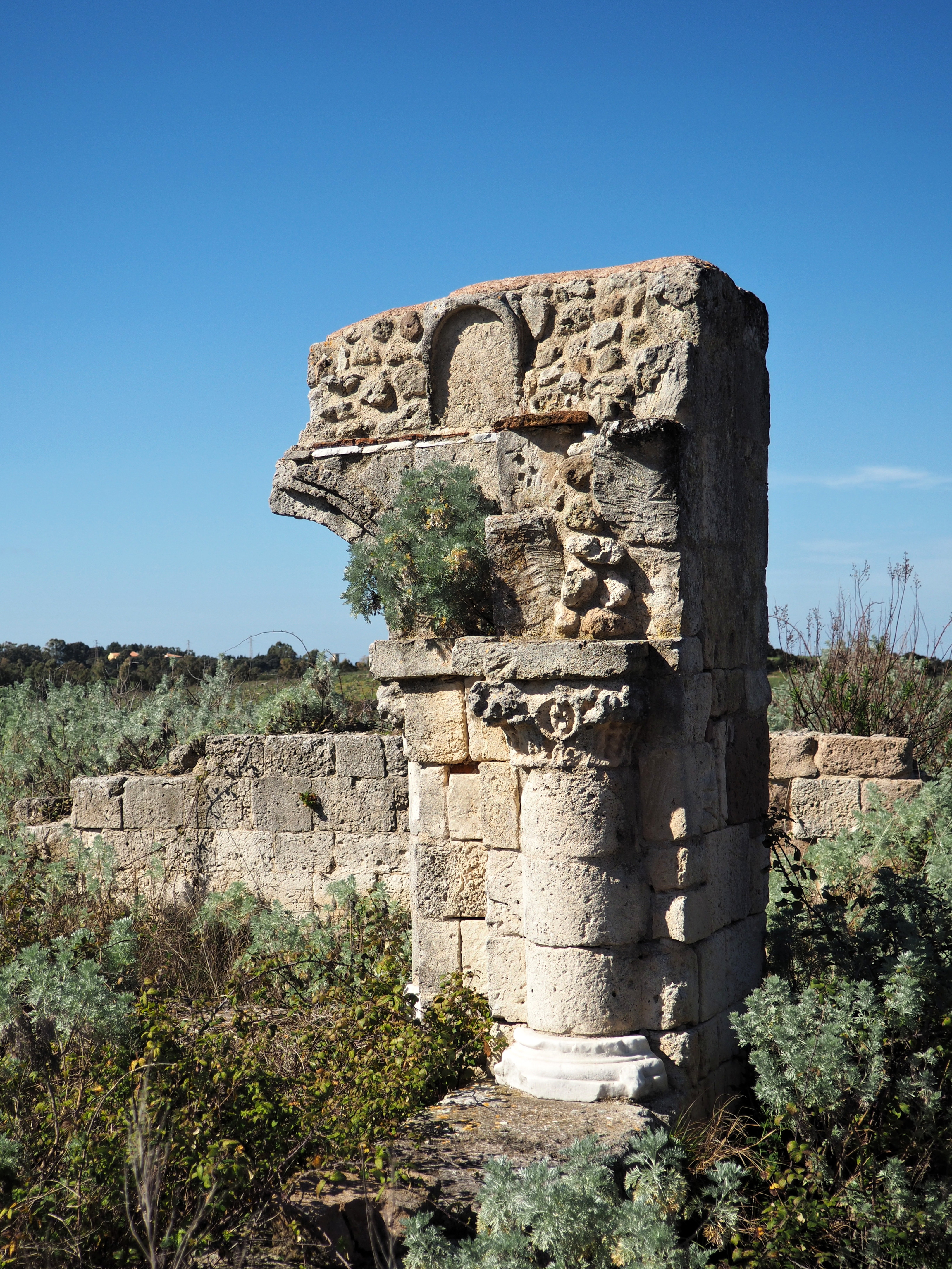 Un pilastro d'angolo con semicolonna e capitello decorato